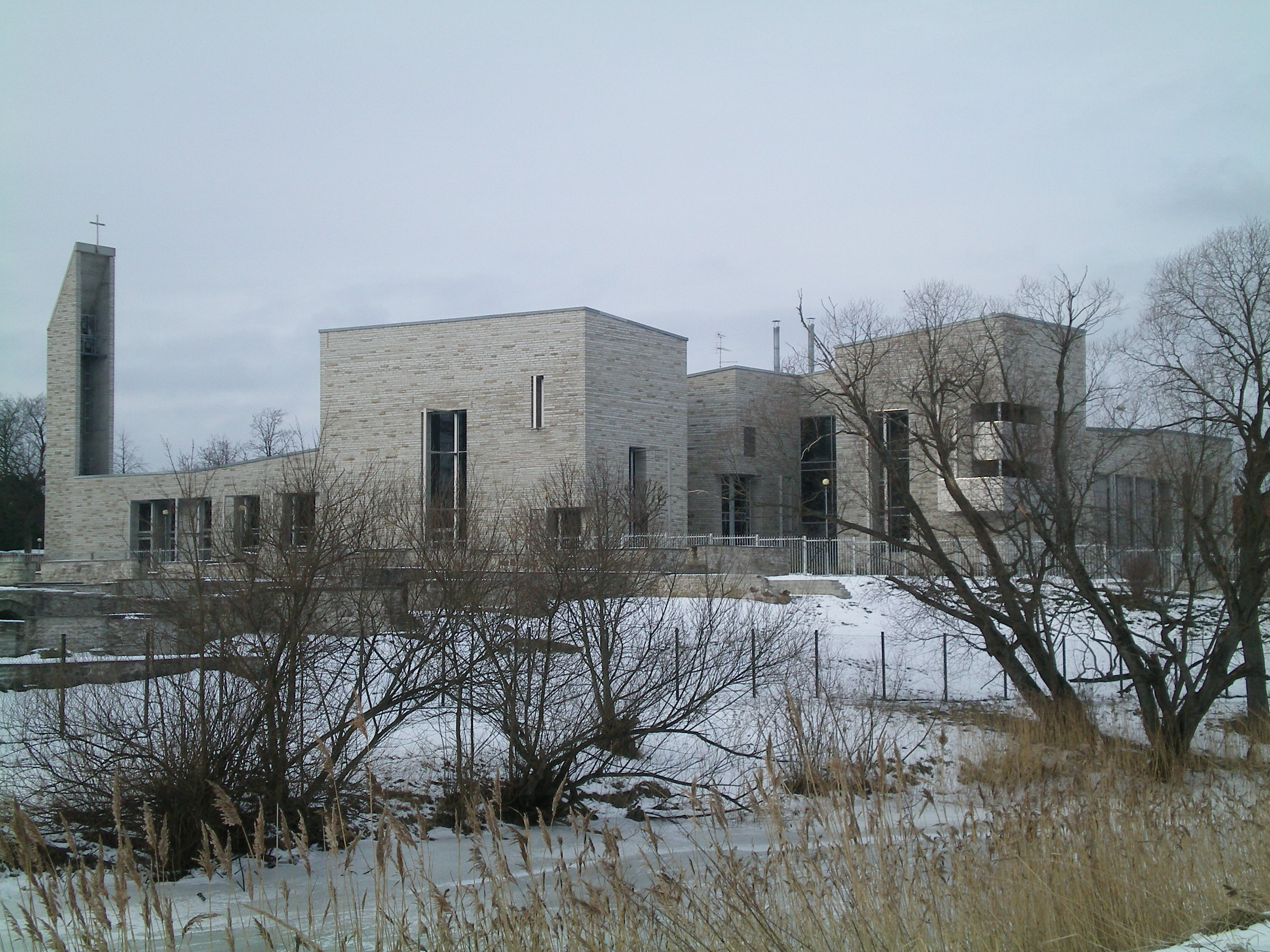 Neubau des Brigittenklosters in Tallinn